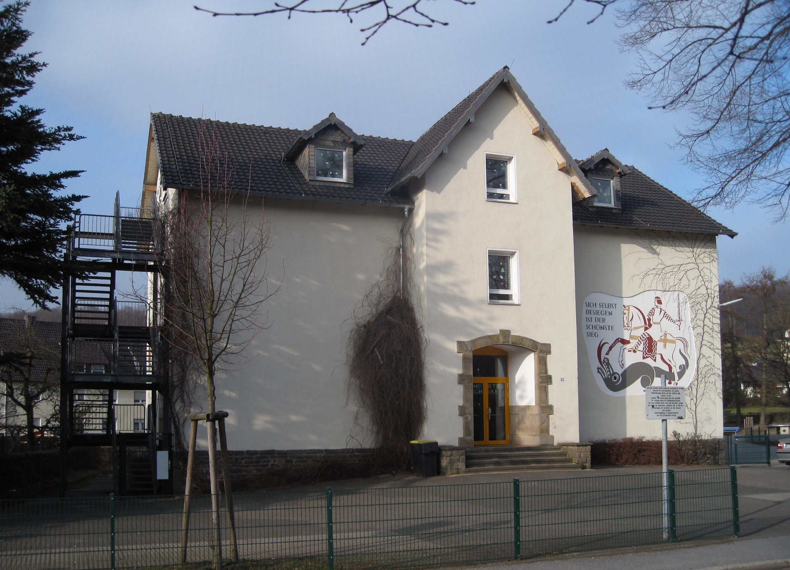 Ihmerter Grundschule in Hemer-Ihmert, Heinrich-Goswin-Straße 18.